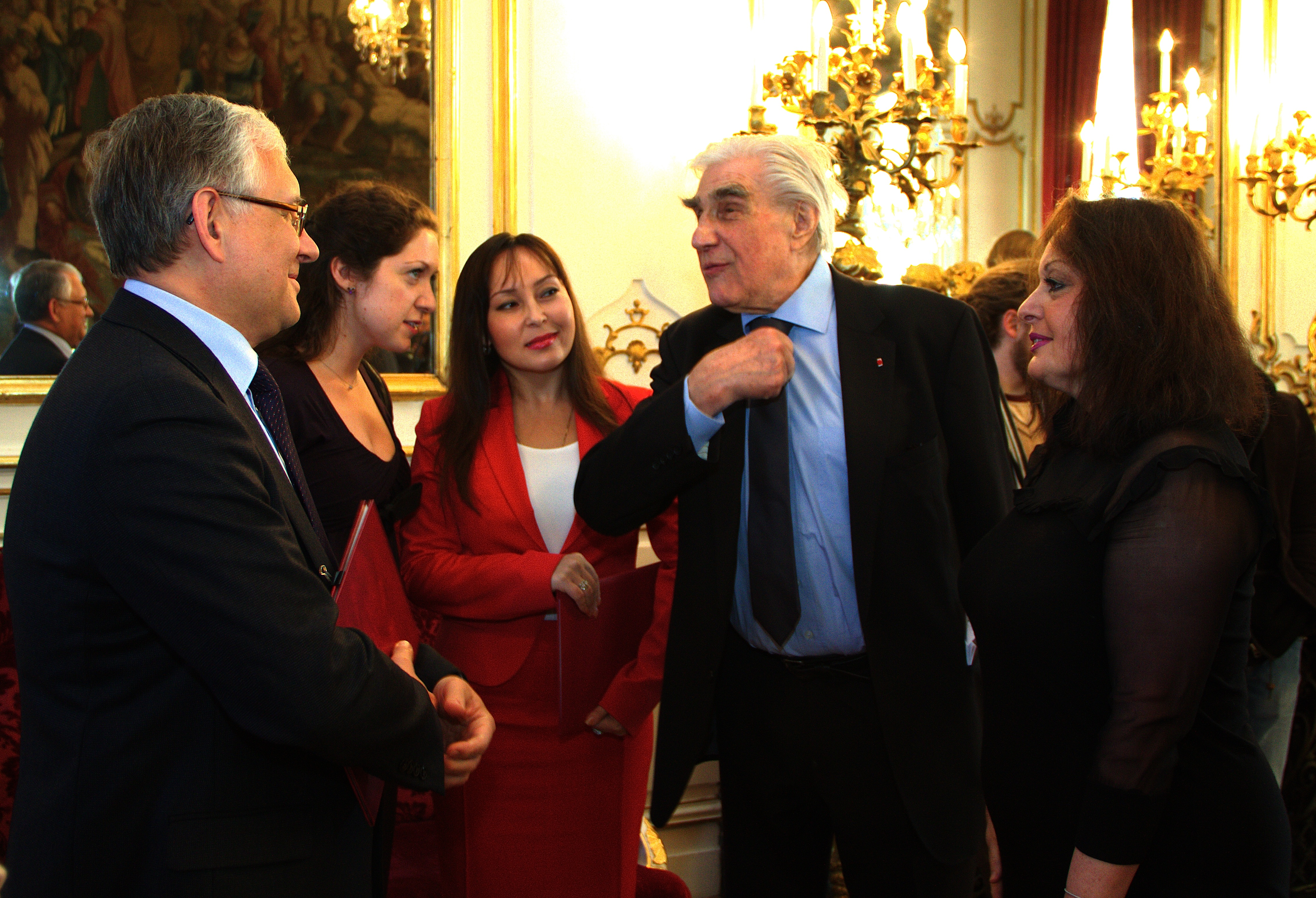 De gauche à droite : Alexandre Bourdine, consul général de Russie à Strasbourg, l’interprète, Carmen Basangova, recteur de l’Académie polaire d’État à Saint-Petersbourg, Jean Malaurie et Giulia Bogliolo Bruna, ethno-historienne et biographe.